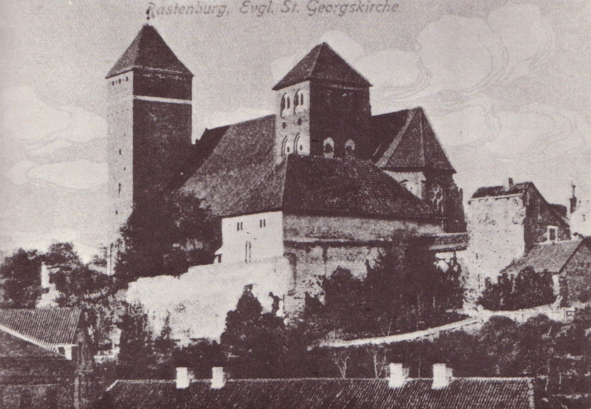 Kościół św. Jerzego w Kętrzynie (ok. 1880)